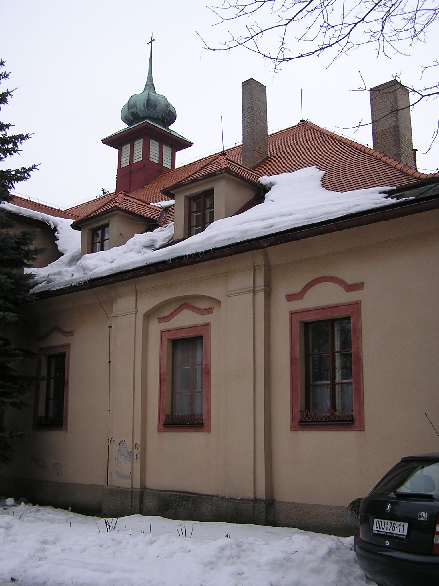 Zámek - zámeček Hoješín, Hoješín 1